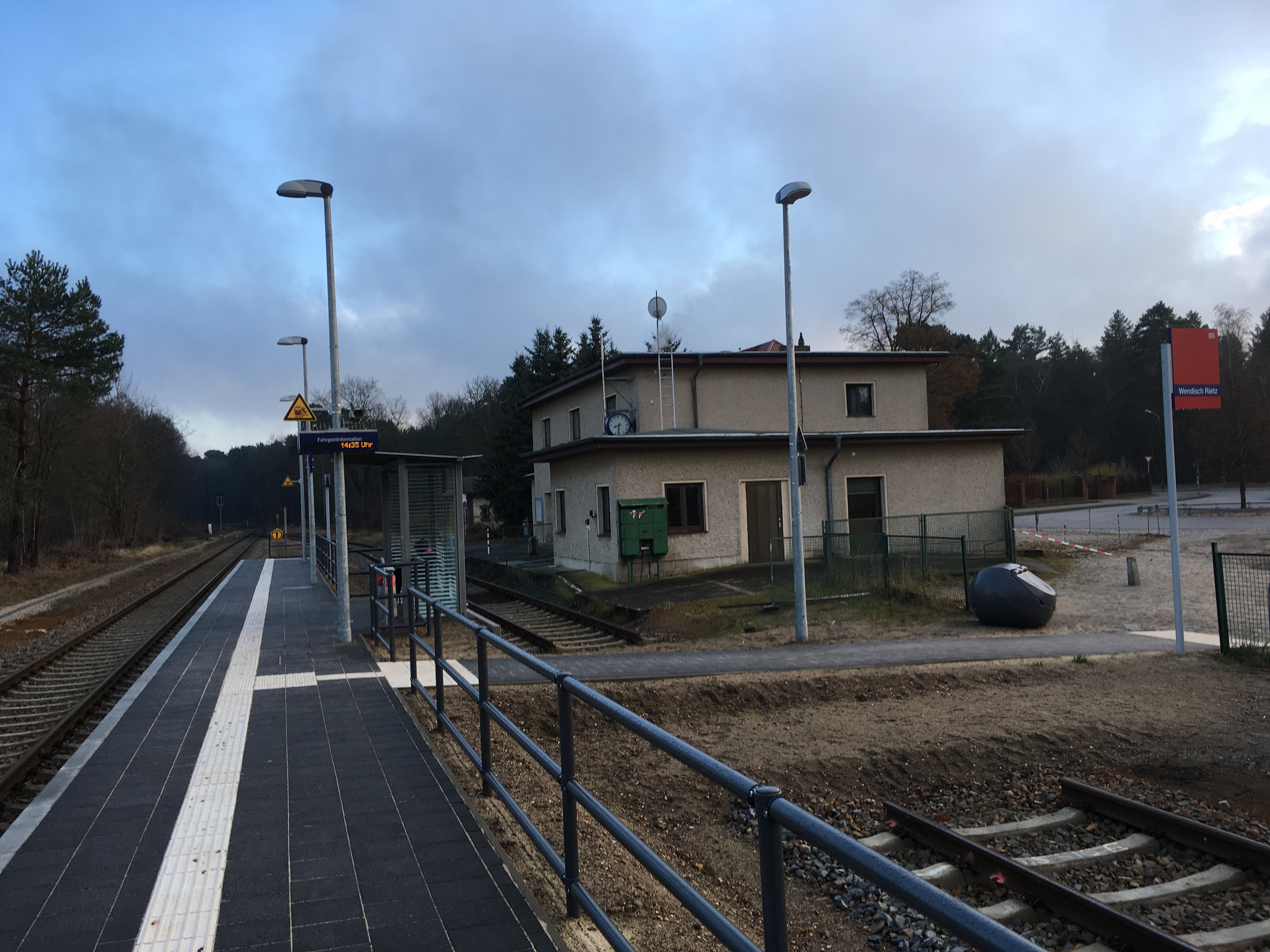 Dezember 2016: Seit August ist der ehemalige Bahnhof nur noch ein Haltepunkt.